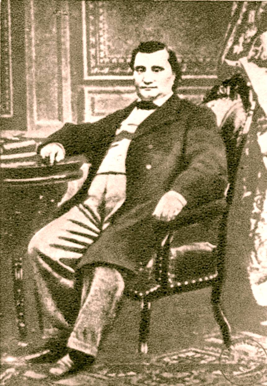 Matei Millo (1814 - 1896), Romanian actor